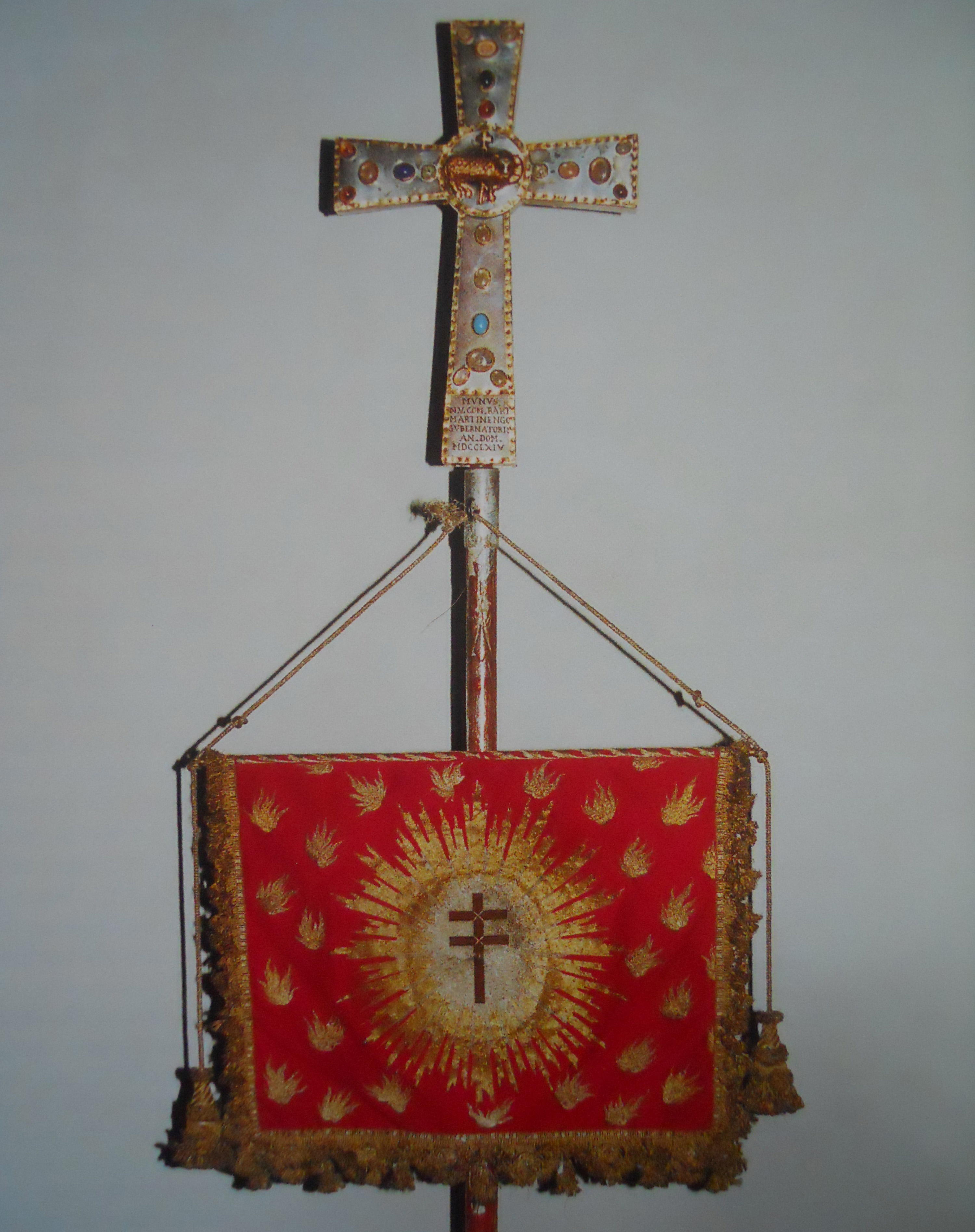 stendardo compagnia.jpg